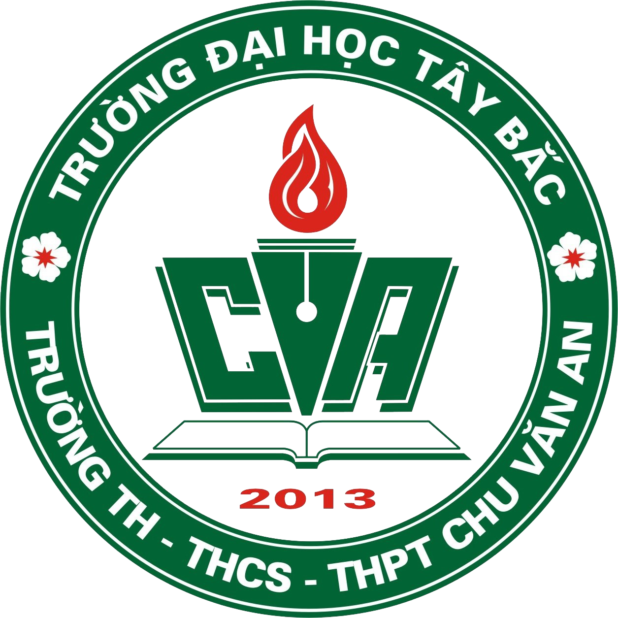 Logo Trường TH, THCS & THPT Chu Văn An - ĐH Tây Bắc